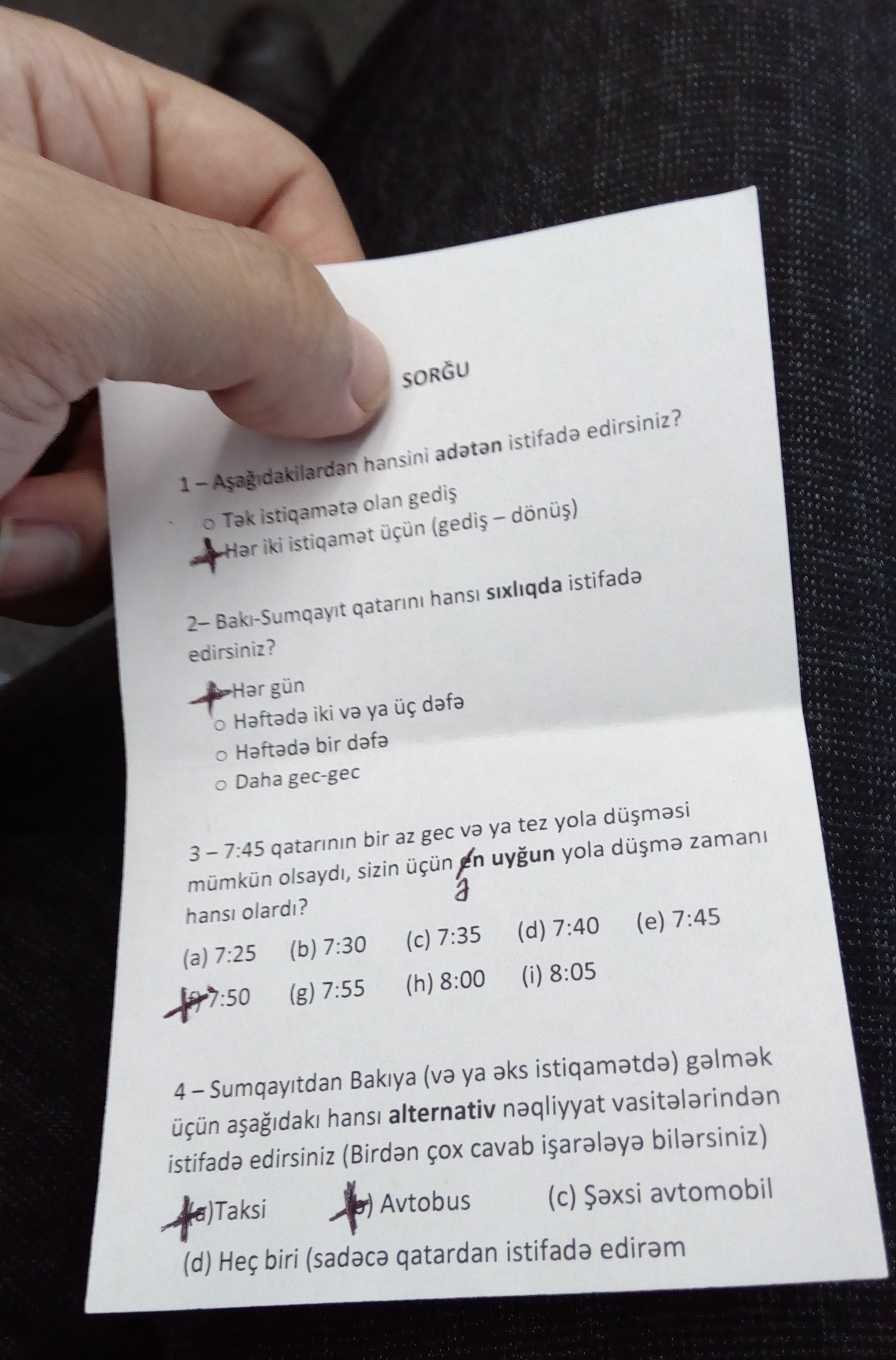 Bakı-Sumqayıt qatarında keçirilmiş sorğu